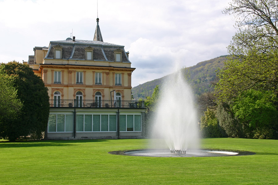 Villa Taranto all'interno dell'omonimo parco botanico, oggi sede della prefettura della provincia del VCO